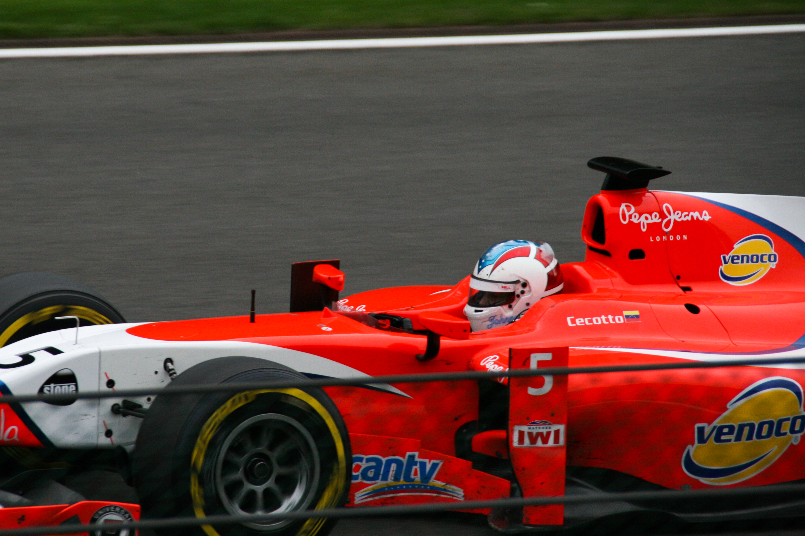 Johnny Cecotto jr. beim Hauptrennen im Belgien 2013